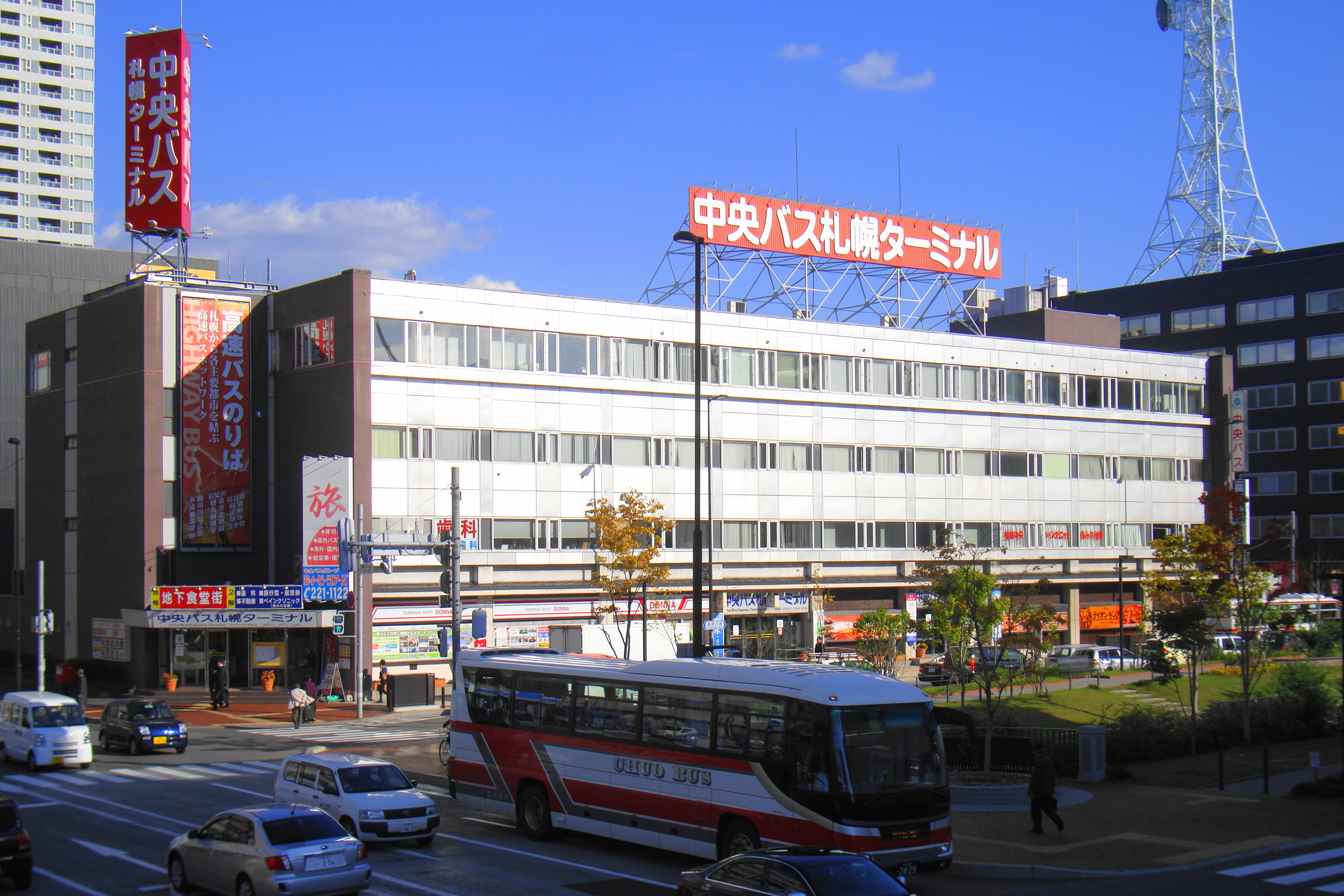 Sapporo Bus Terminal